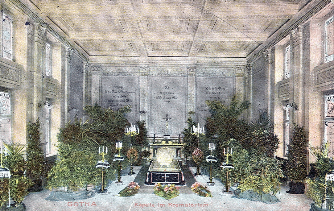 Postkarte, datiert 17.10.1913. Beschriftung:"Gotha - Kapelle im Krematorium".